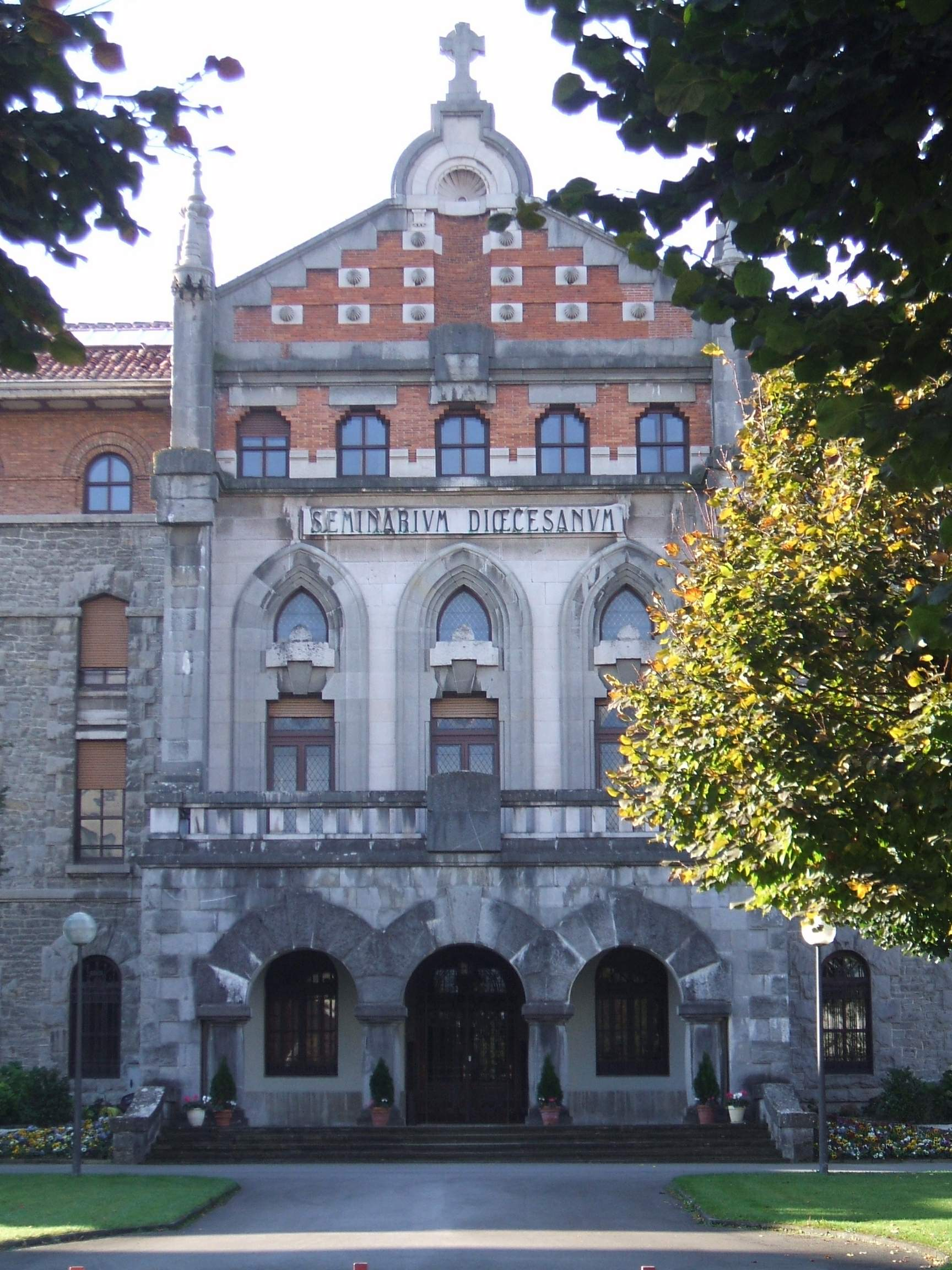 Seminario Diocesano de Vitoria